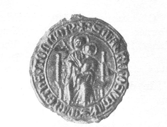 Fig. 56. Burkard IV. v. Schwanden, Hochmeister des DRO 1283–1290